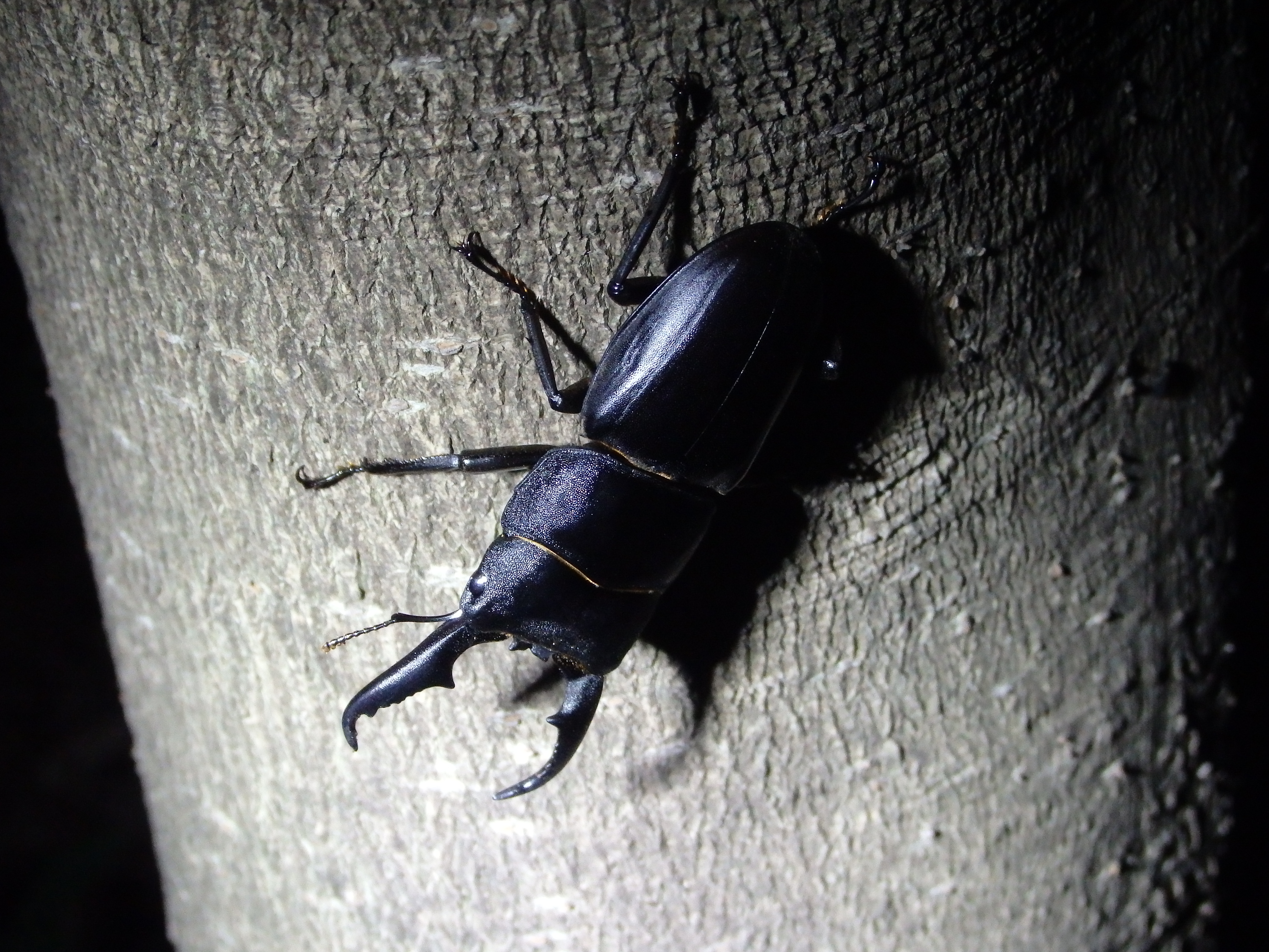 撮影地：東京